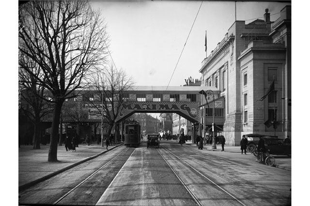 Frank-Henri Jullien (1882-1938), Le Salon de l’automobile au Bâtiment électoral, 1924, négatif au gélatino-bromure d’argent sur verre, inv. VG N 18 x 24 3718